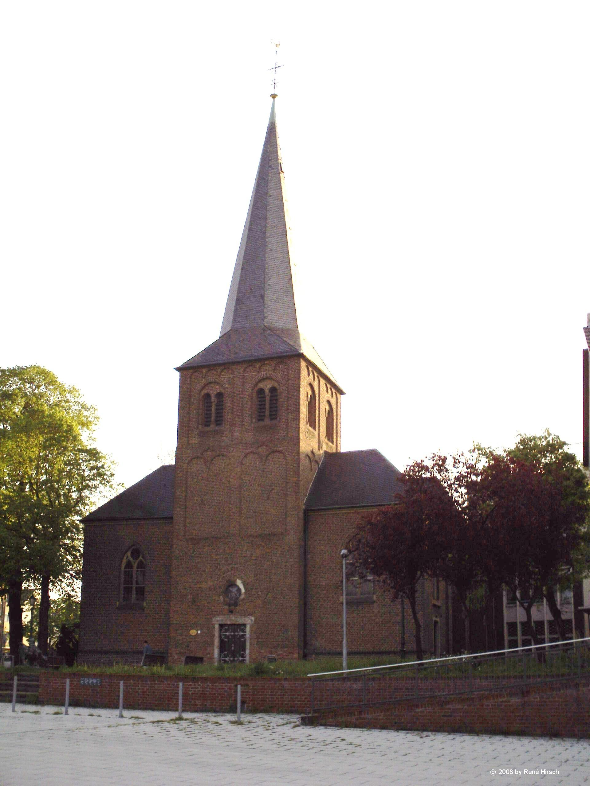 kath. Pfarrkirche St.Antonius in Leverkusen-Wiesdorf